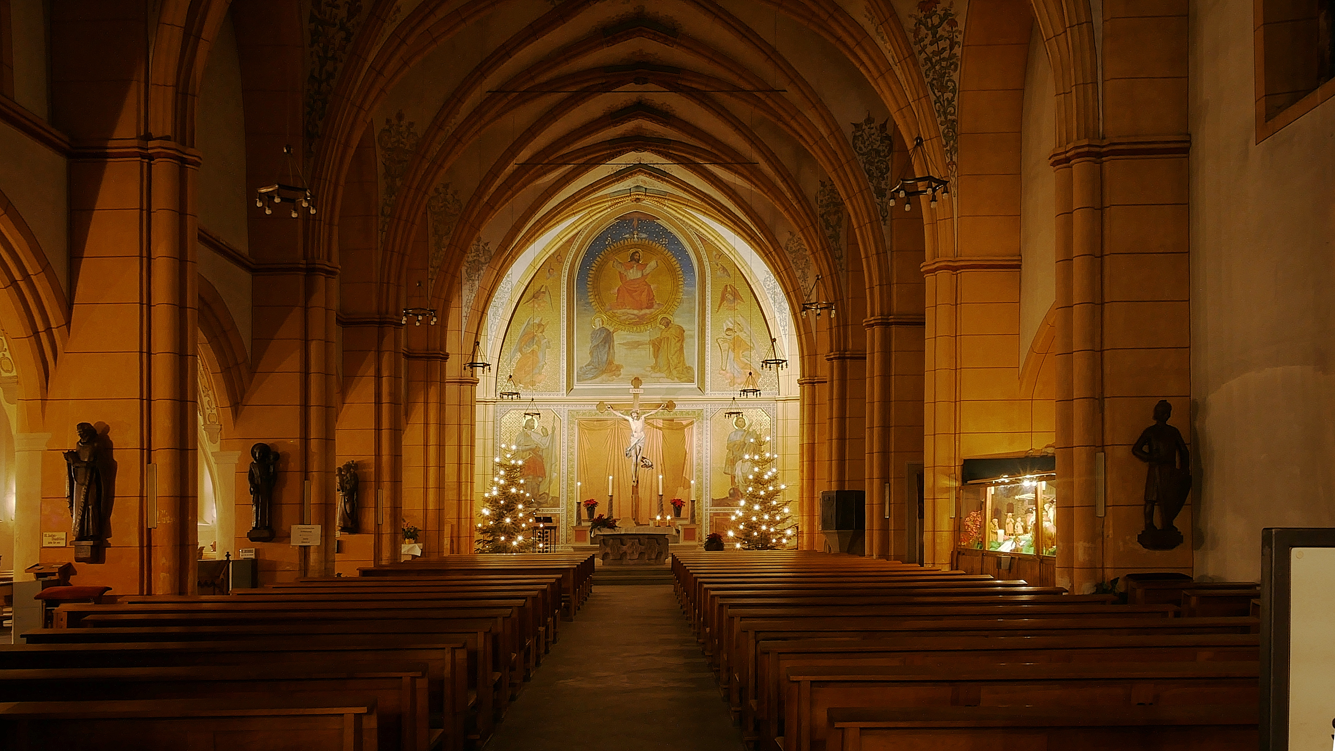 Trier, katholische Stadtkirche St. Gangolf, Kirchenschiff abends, nur Altar beleuchtet